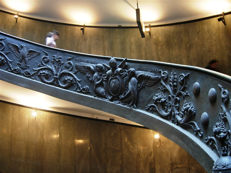 Vatican Museum